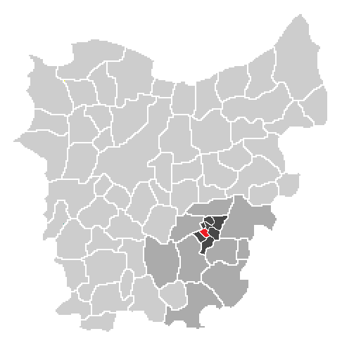 Oost-Vlaanderen uitgeknipt en bewerkt